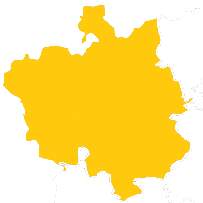 Región Mixteca, una de las ocho regiones que conforman al estado mexicano de Oaxaca.